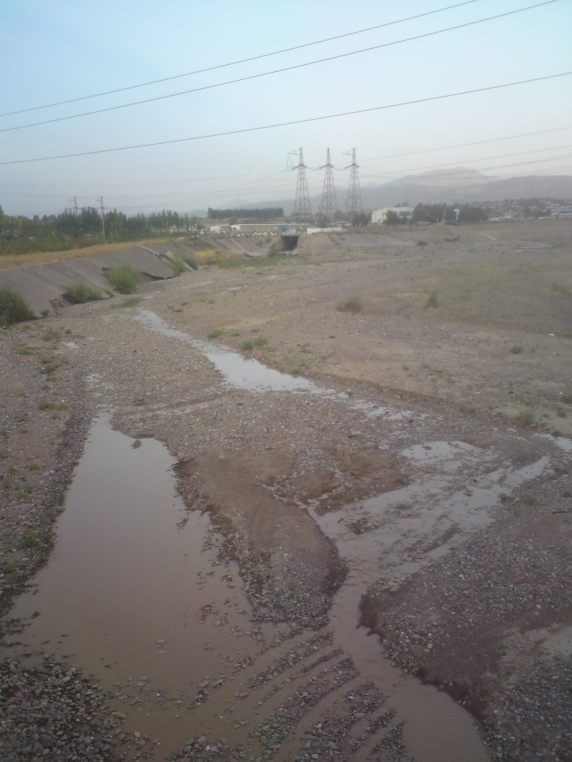 Река (сай) Паркентсай в маловодный период (август), у города Паркент, Ташкентский вилоят, Узбекистан